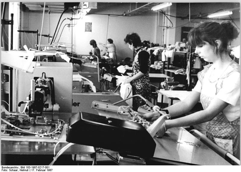 ADN-ZB-Schaar-17.2.1987-pra-Bez. Suhl: Modische Herrenhemden von Welton-Im ersten Halbjahr werden in der Welton-Herrenwäschefabrik Meiningen neun neue Herren-und Knabenhemdenmodelle in die Produktion überführt. Dazu gehören sportliche Herrenhemden mit angeschnittenem Ärmel, Westenhemden ohne Ärmel und Erzeugnisse mit vielen Extras wie Bordüren, modische Taschenverarbeitung und aktuelle Farbkombinationen. Das bisherige Planplus im Wert von rund 120000 Mark soll in den kommenden Monaten auf der Grundlage zahlreicher Rationalisierungslösungen ausgebaut werden. So erhöhen Schnellnähmaschinen aus dem Kombinat Textima die Verarbeitungsgeschwindigkeit. Eine hohe Produktivität sichern u.a. die Taschenaufnähautomaten. - siehe auch 1987-0217-2N